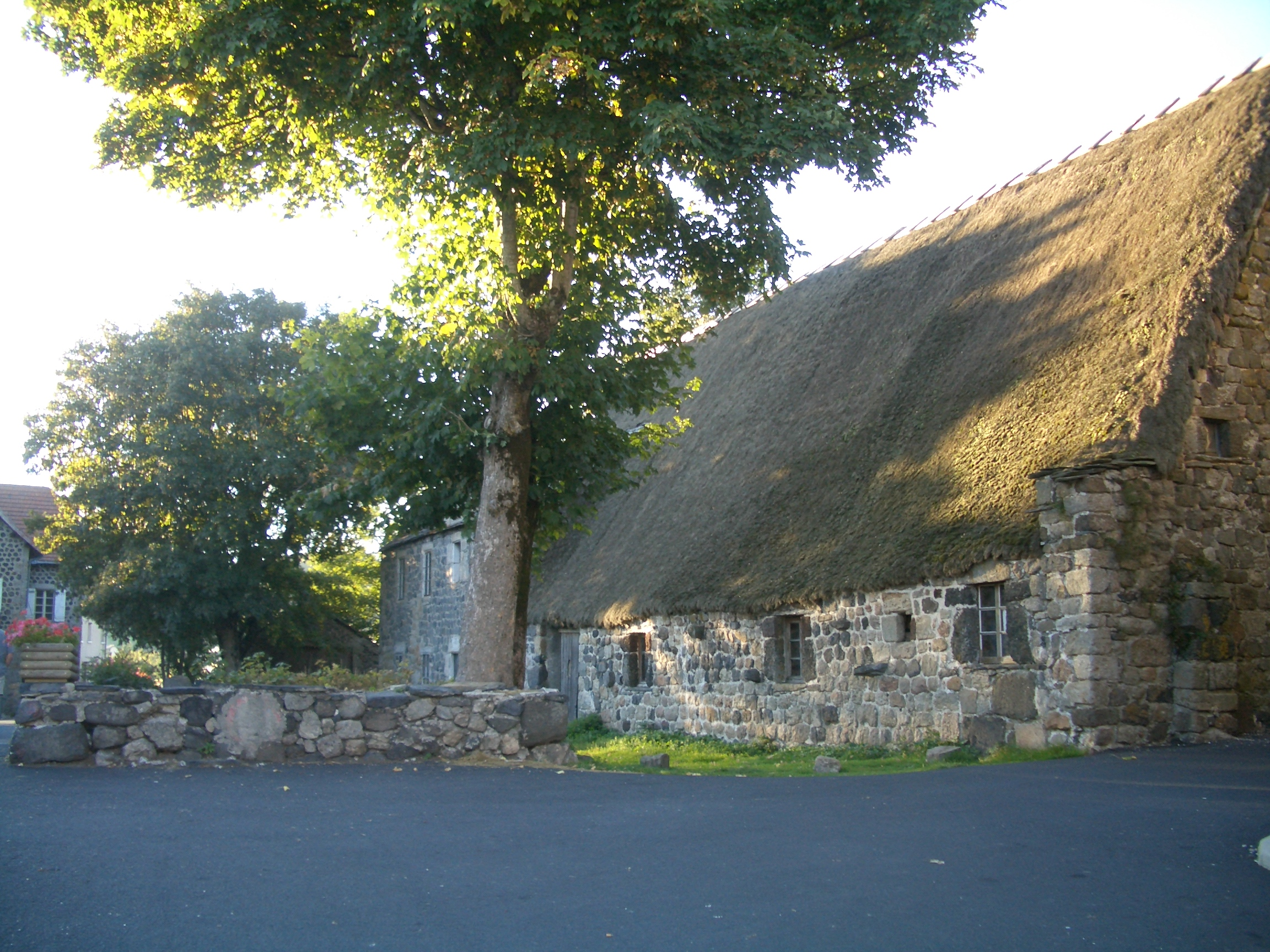 Maison à toit de genêt dans le centre de Sainte-Eulalie (Ardèche)